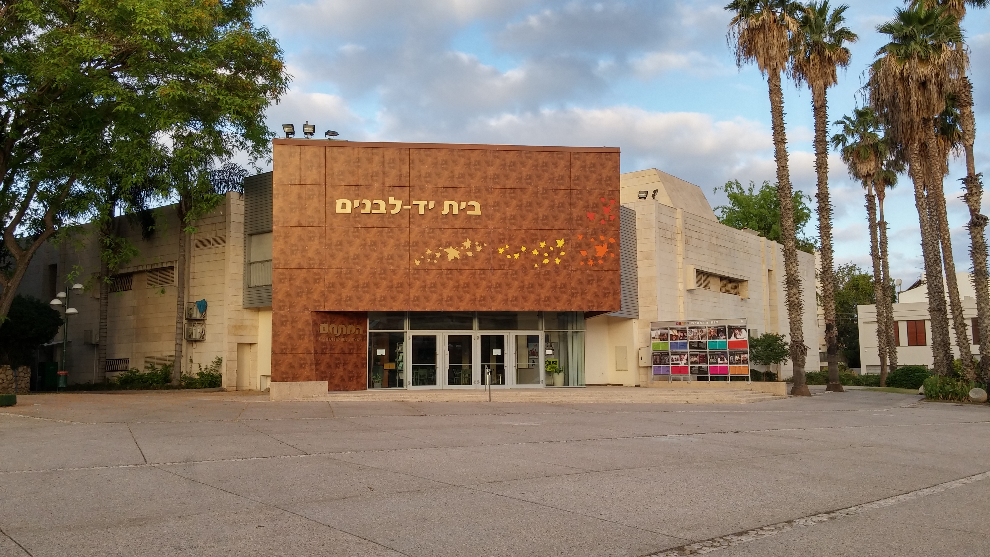 בית יד לבנים רמת השרון, 2016